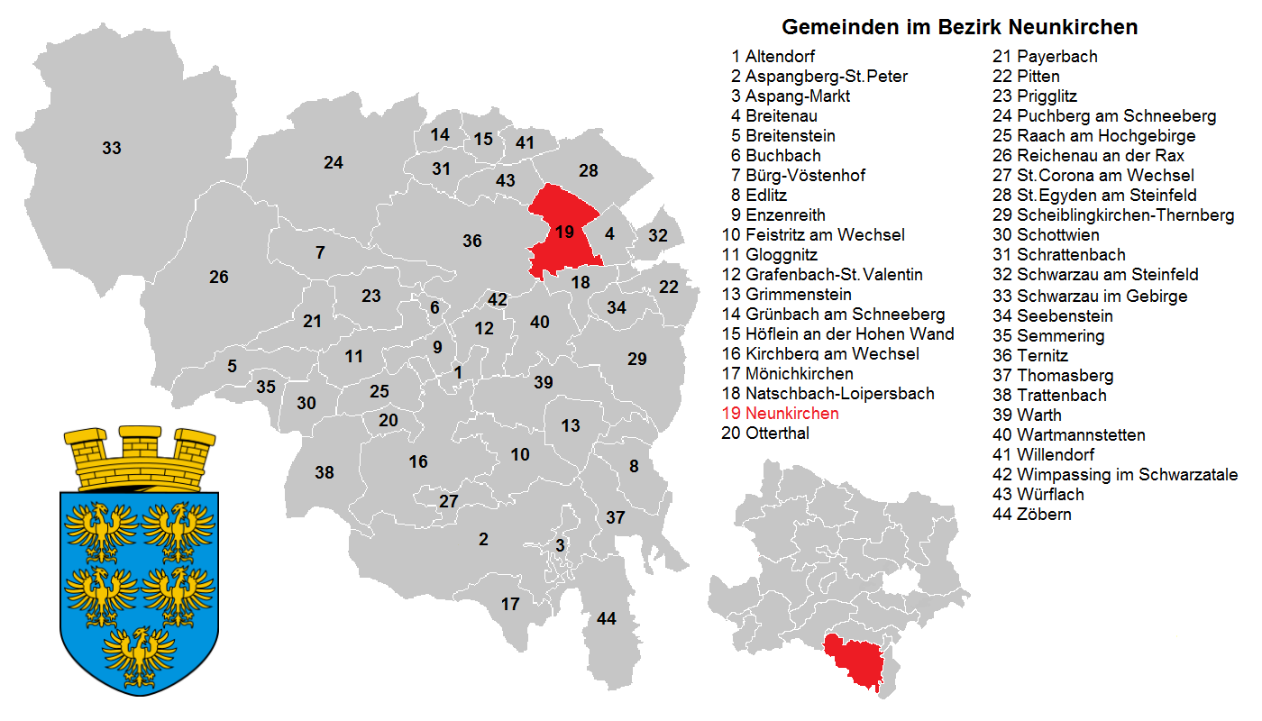 Bezirk Neunkirchen